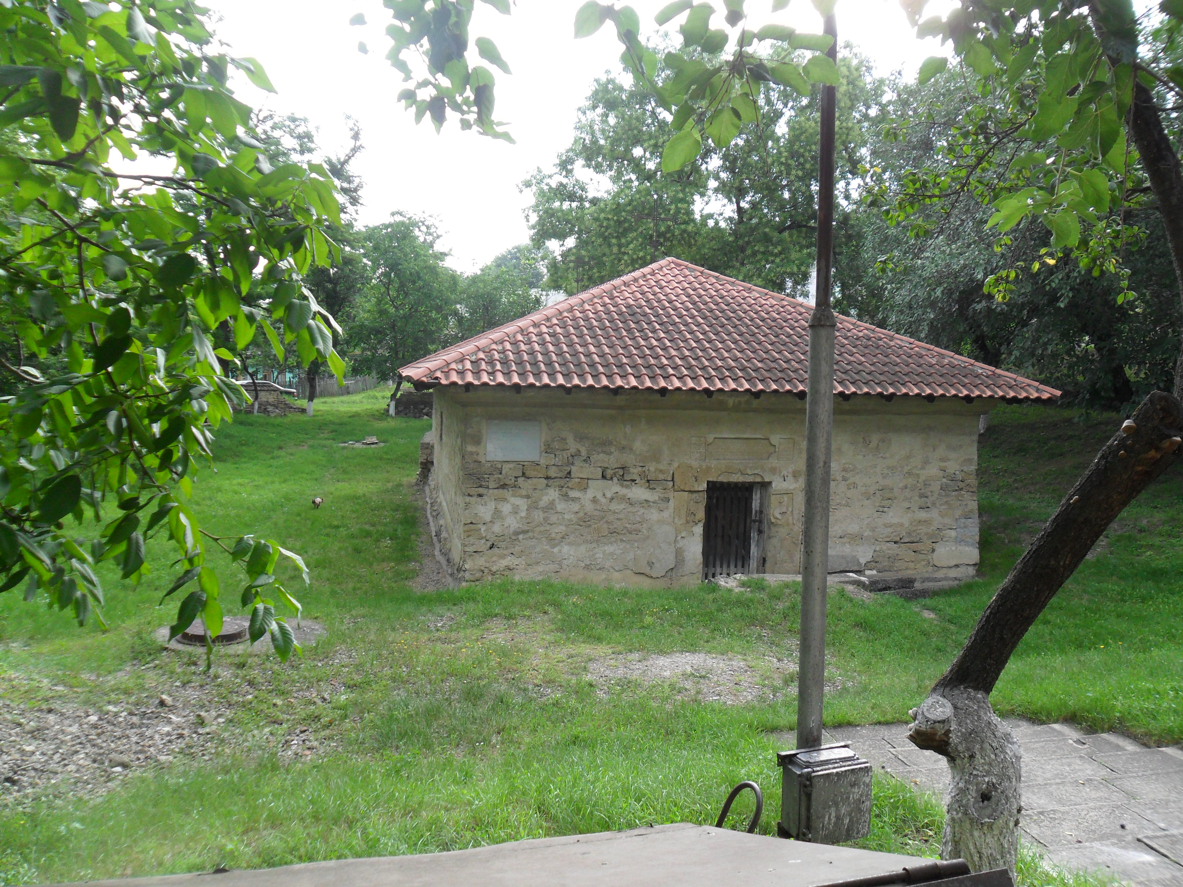 Curtea Bisericii Adormirii Maicii Domnului din Căușeni, monument de arhitectură ce datează din sec. XVI-XVIII. La data fotografierii (iulie 2013) se afla în reconstrucție.